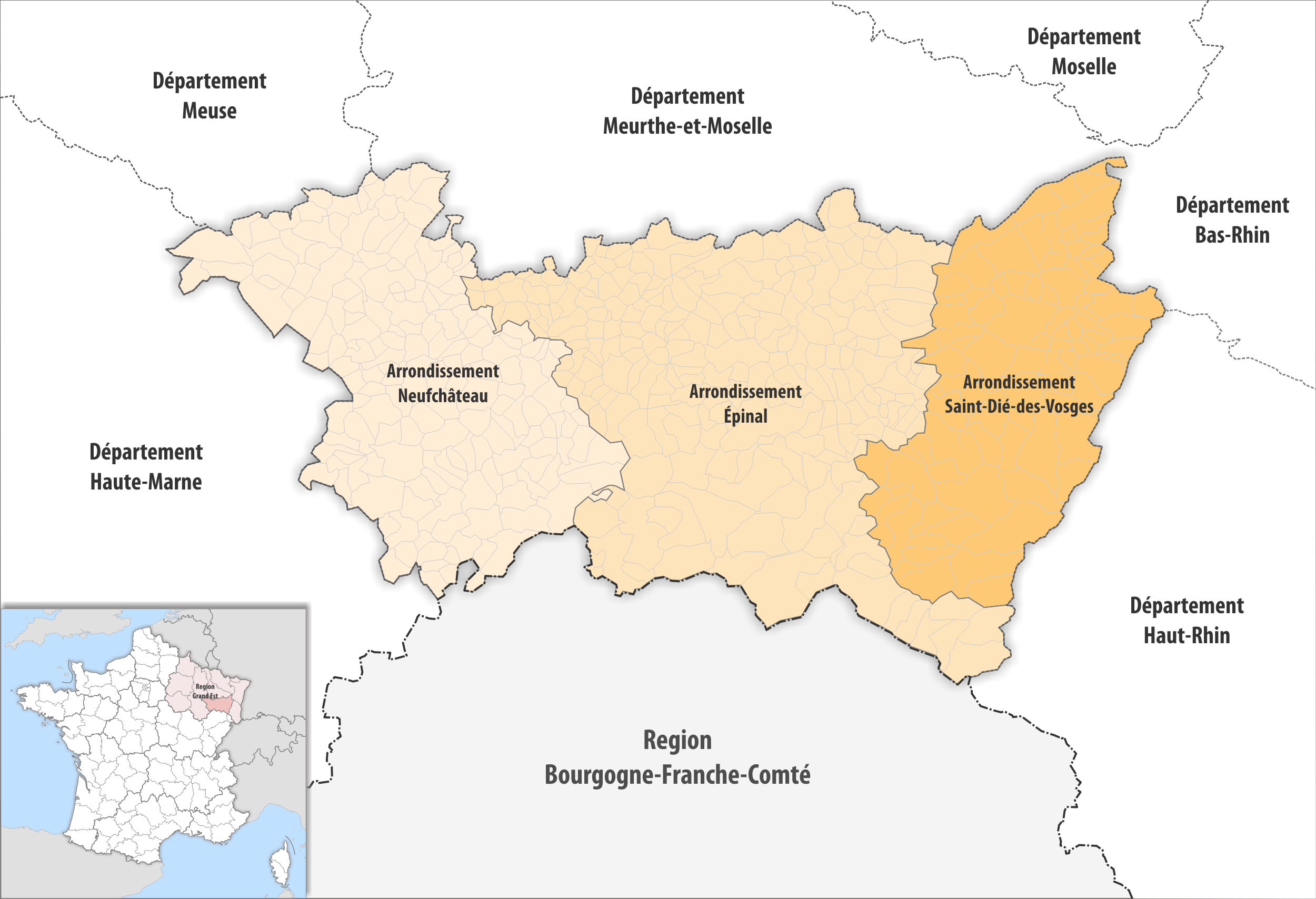 Gemeinden und Arrondissemente im Departement Vosges